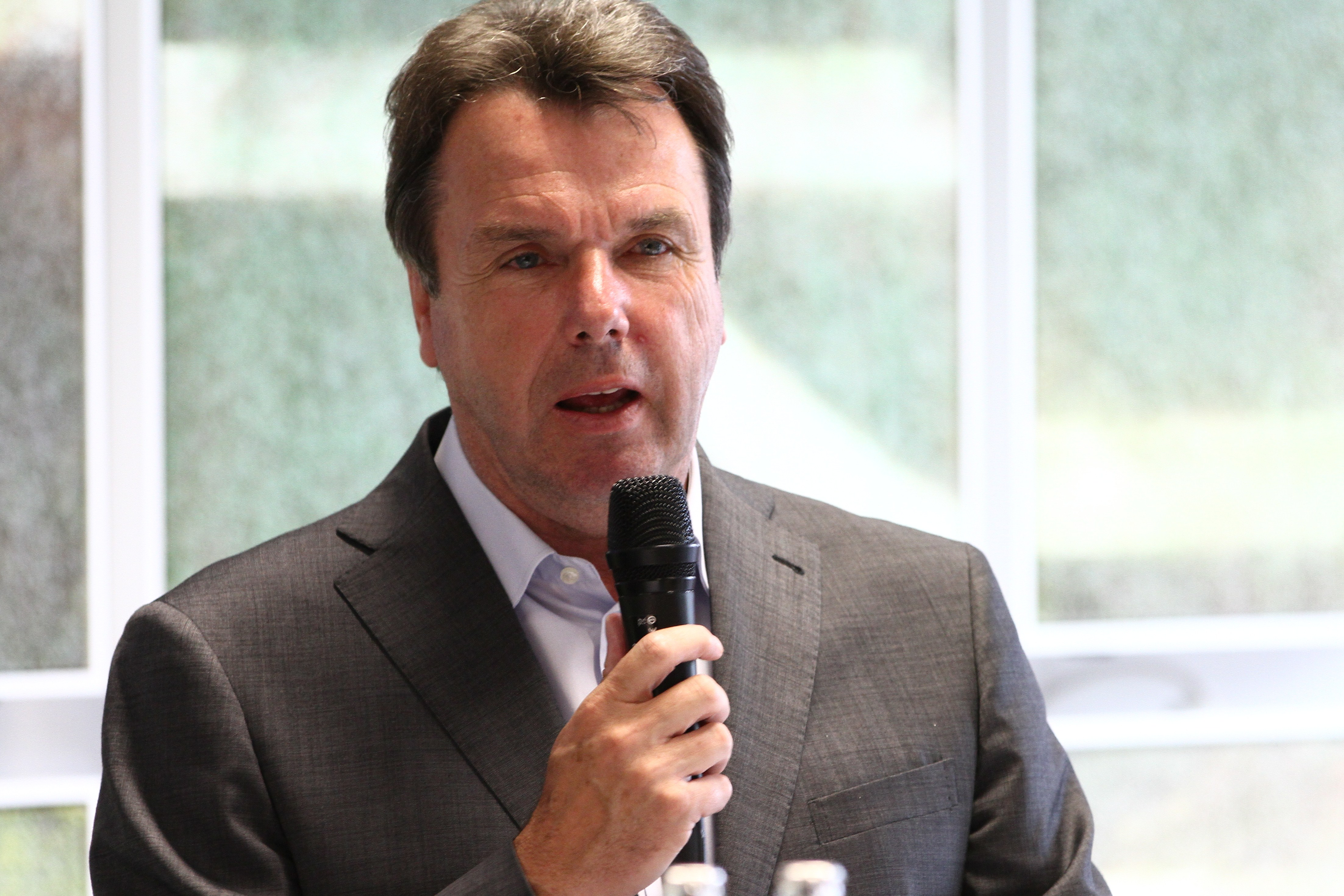 Heribert Bruchhagen, Vorstandsvorsitzender der Eintracht Frankfurt Fußball AG, bei der Vorstellung der neuen sportlichen Leitung im Eintracht Frankfurt Museum im Juni 2011